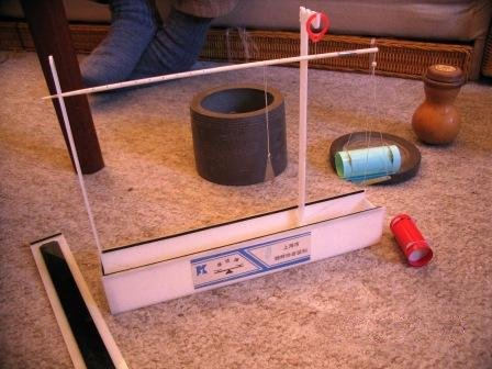 Grillenwaage